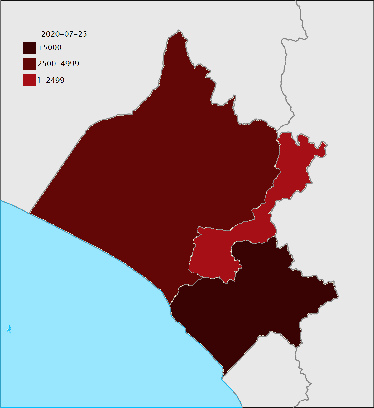 description=